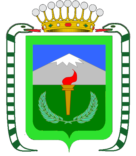 Escudo de la Comuna de Longaví (Chile)